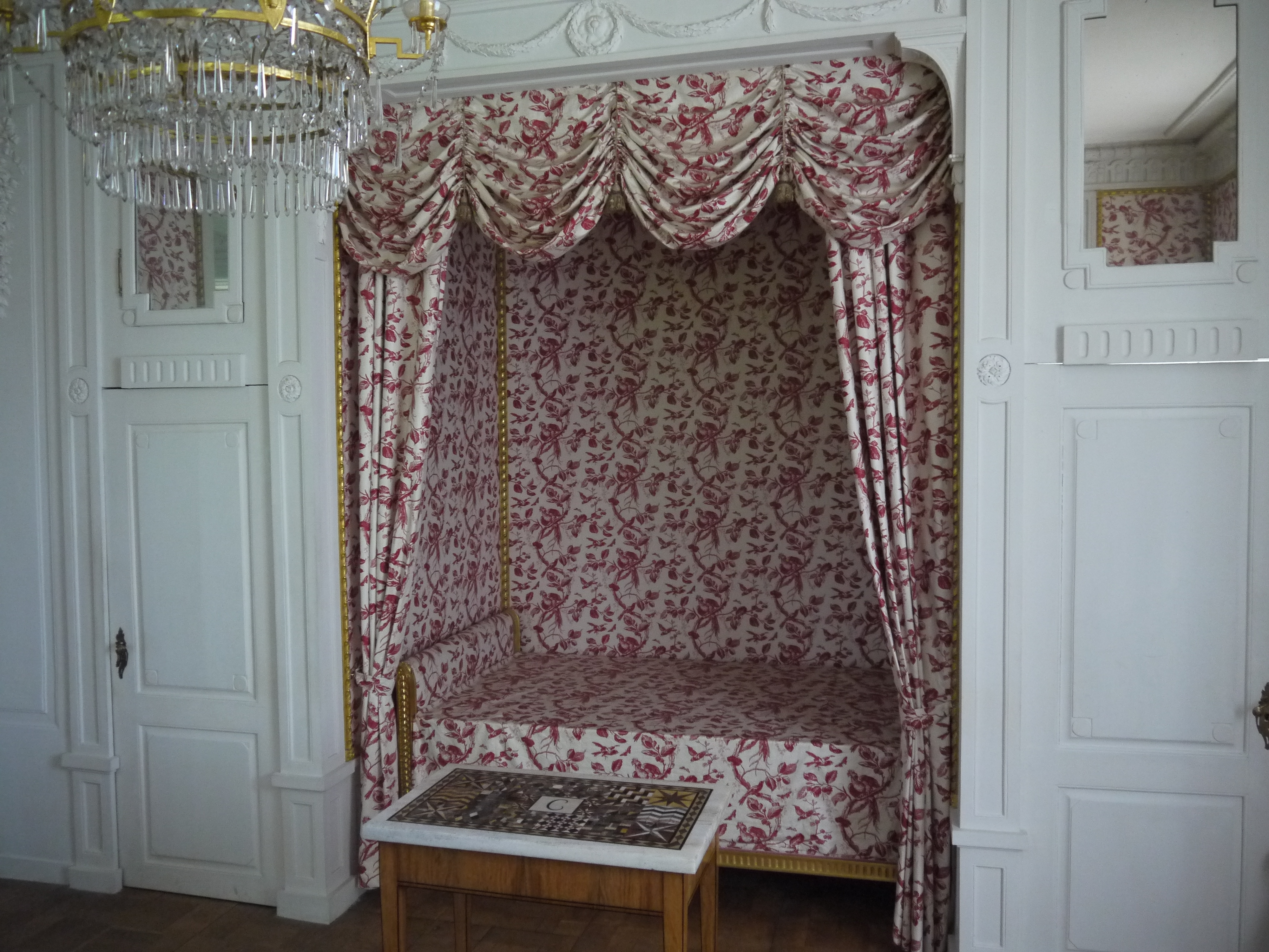 Schlafzimmer im Schloss im Park Schönbusch